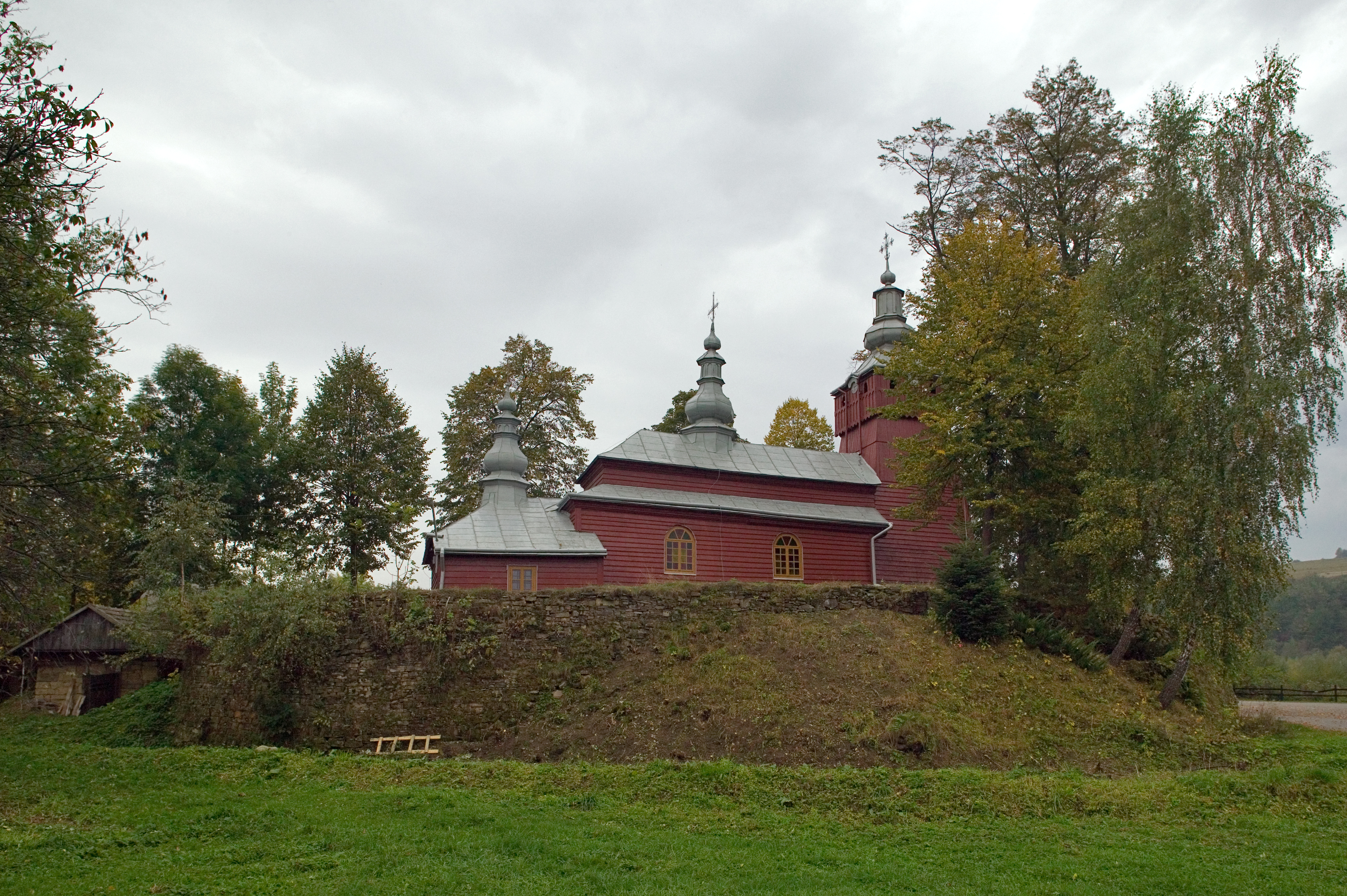 Śnietnica, Cerkiew greckokatolicka pod wezwaniem świętego Dymitra